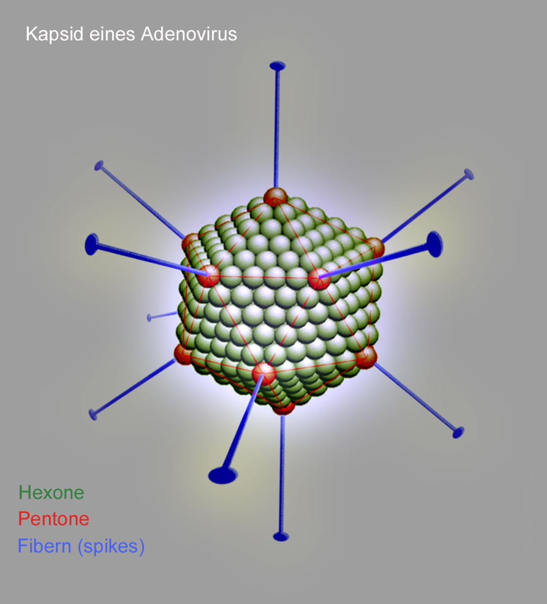 estructura esquemática del cápside de un adenovirus